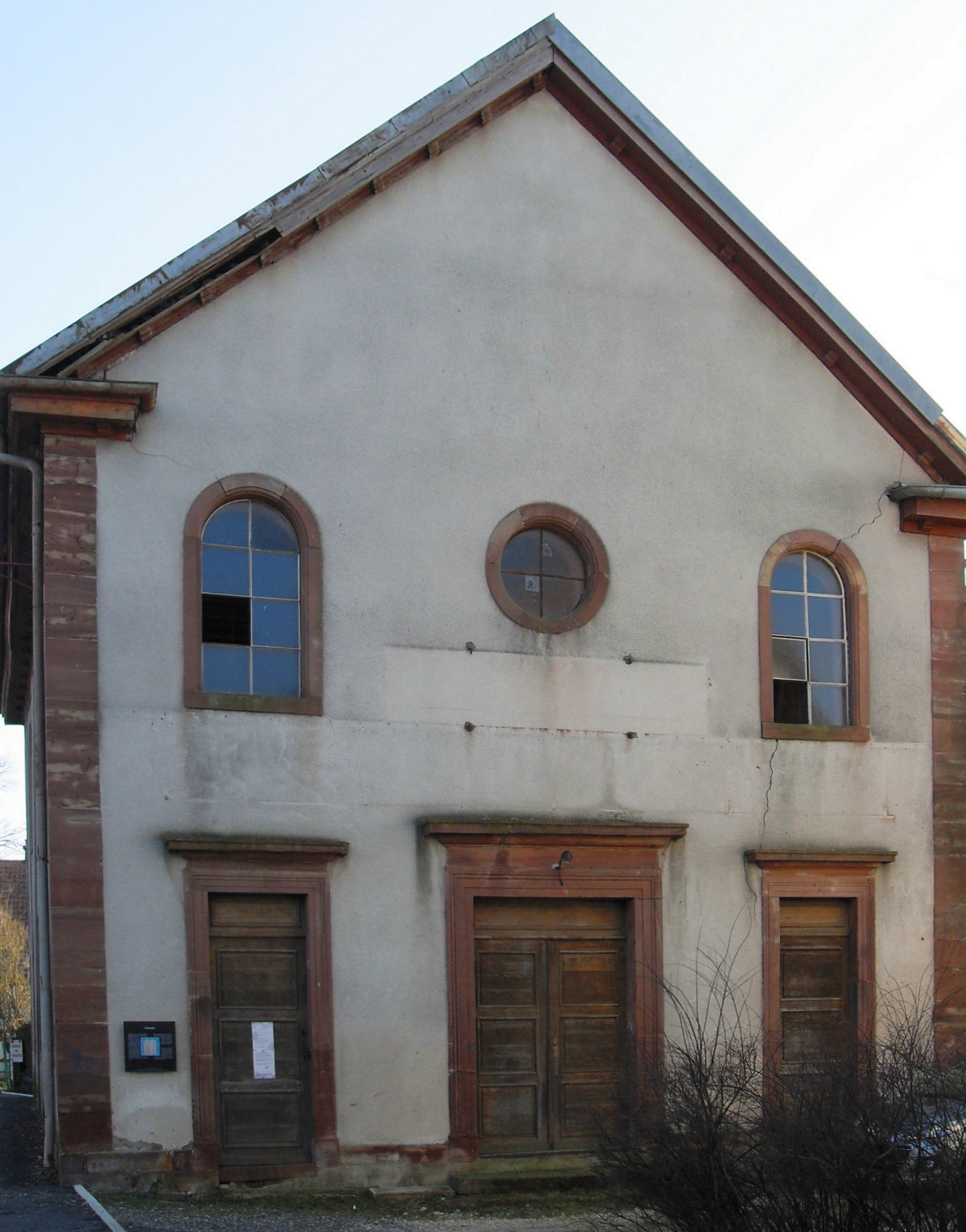 L'ancienne synagogue de Foussemagne, côté nord